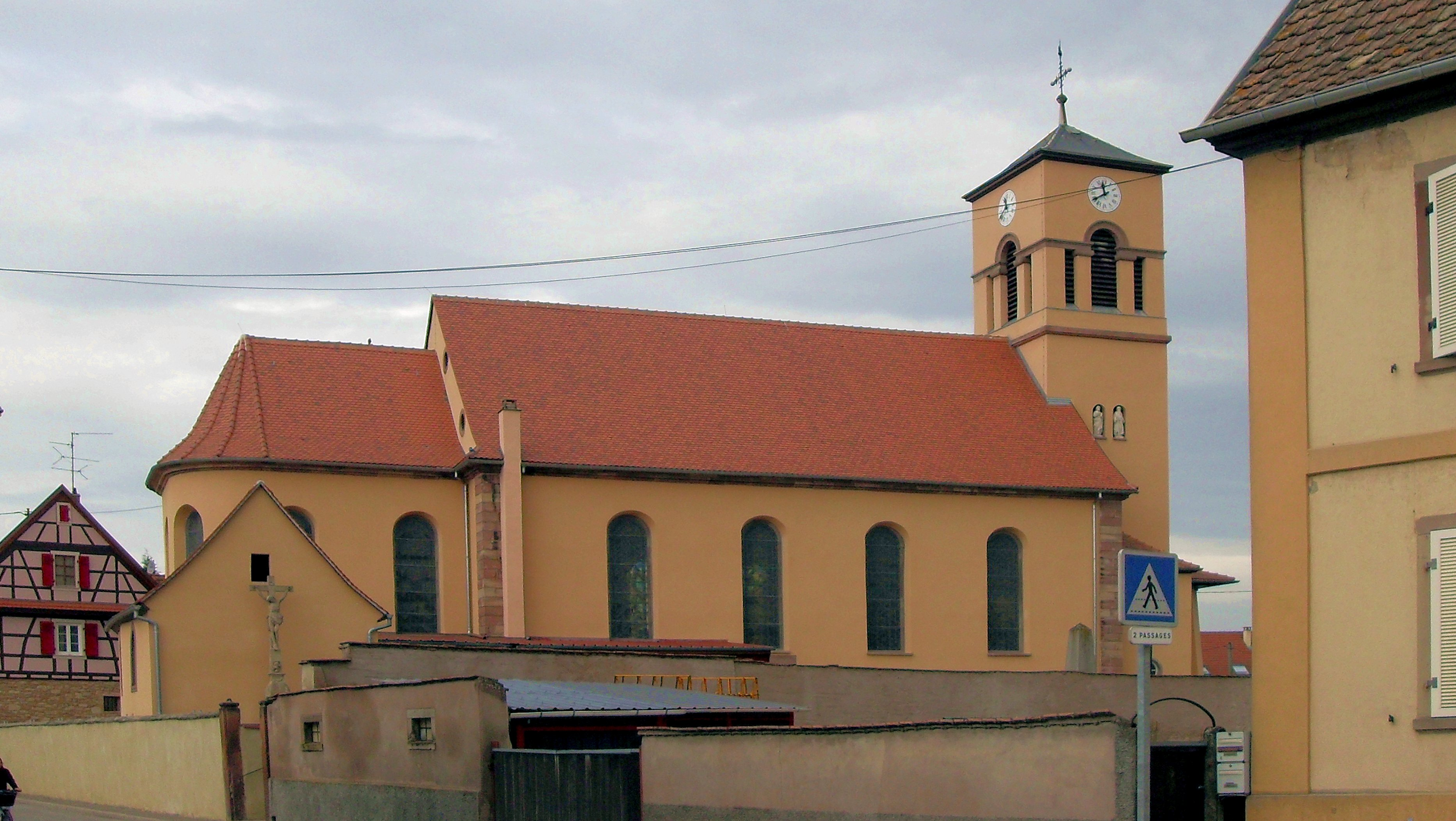 L'église Saint-Martin à Sand